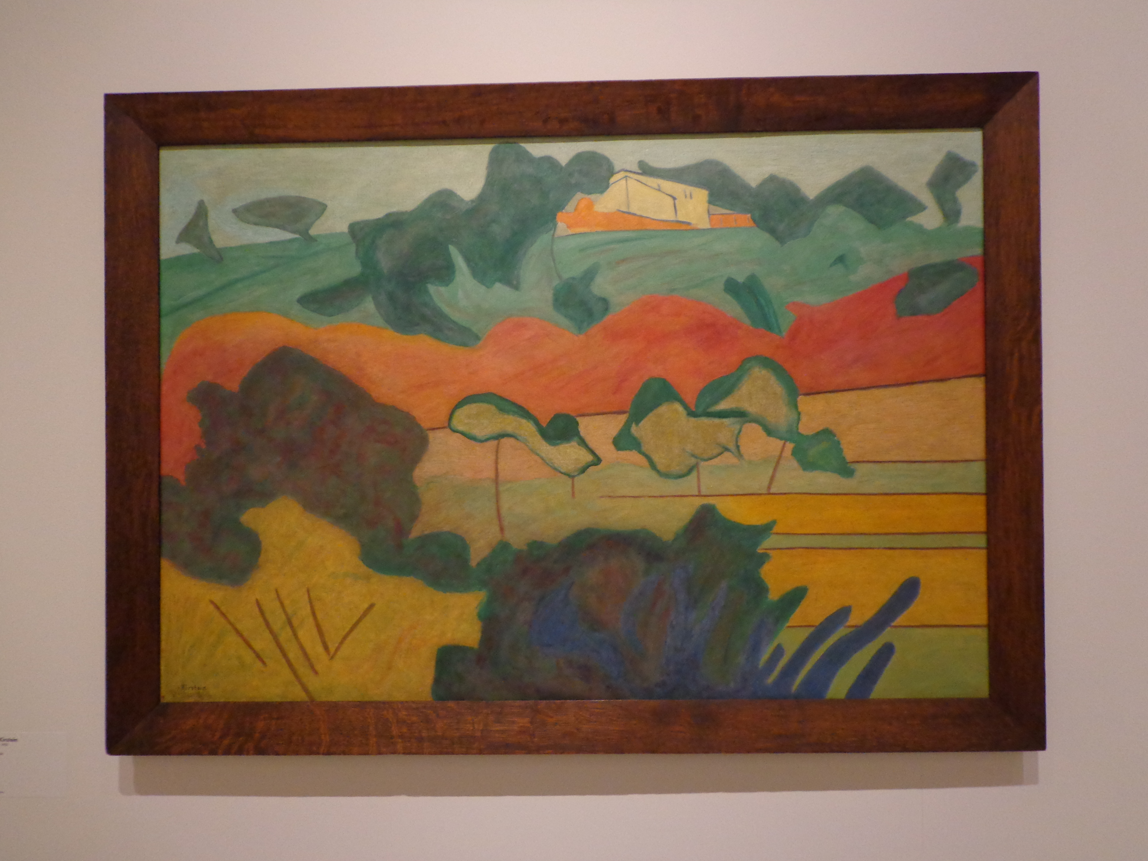 Alfred Kirstein (1863-1922) war ein ebenso bedeutender Arzt wie talentierter Maler. Dieses Landschaftsgemälde (undatiert, wohl um 1905-1910 entstanden) befindet sich in Privatbesitz.